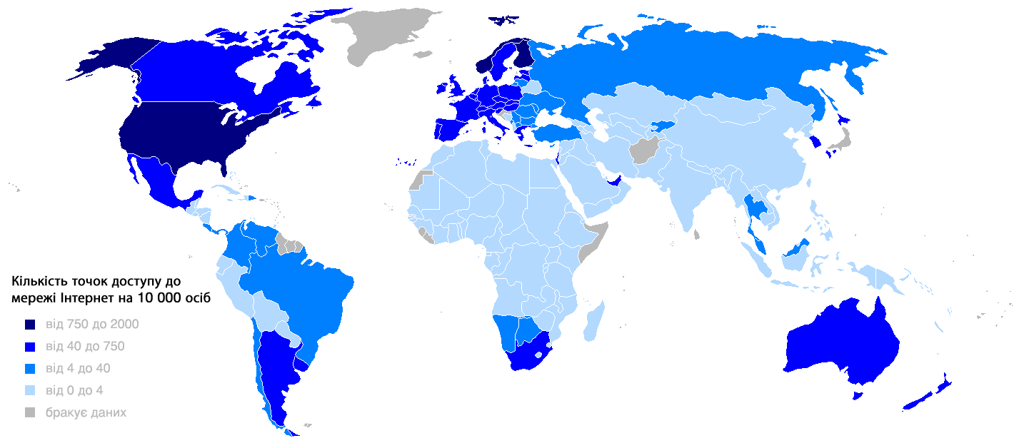 Поширення інтернет-шлюзів